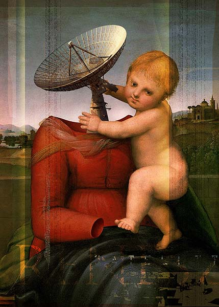 Benedek Imre (Budapest, 1972. február 22.) alkalmazott grafikus alkotása.